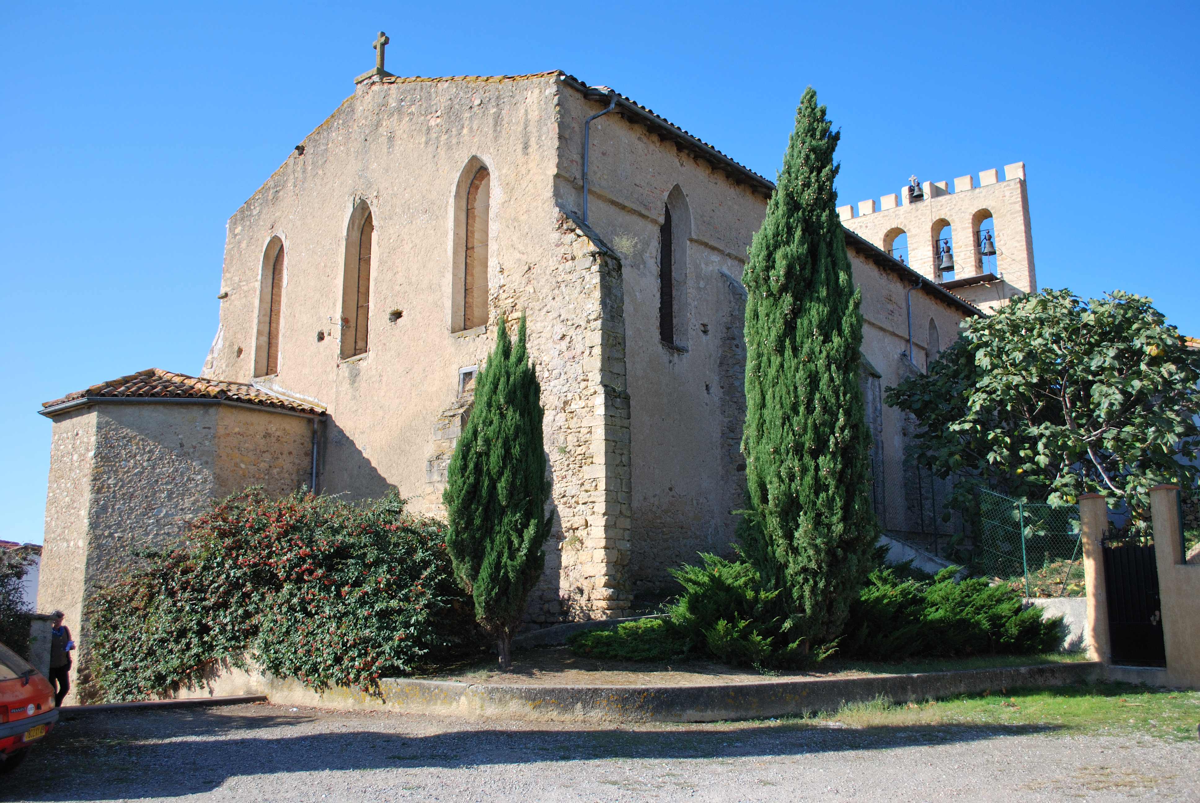 Eglise datant de 1293 1355 surement fortifiée